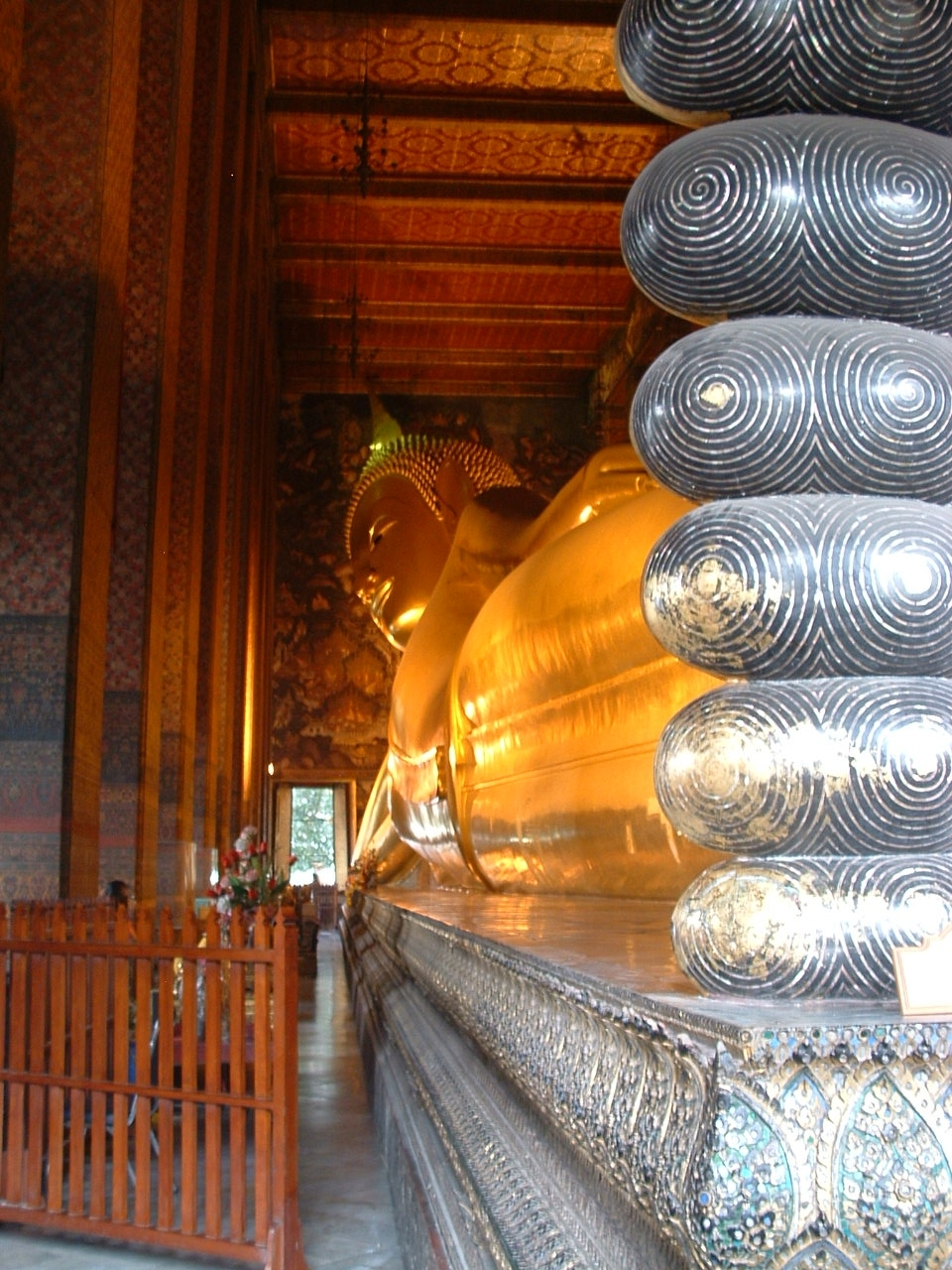 Reclining Buddha at Wat Pho, Bangkok Photograph by Gakuro